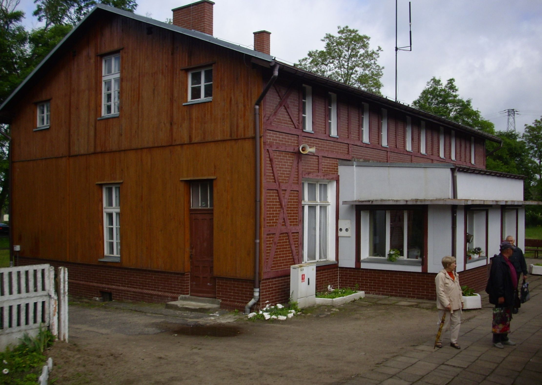 Budynek stacji kolejowej w Karlinie – po odbudowie po pożarze.